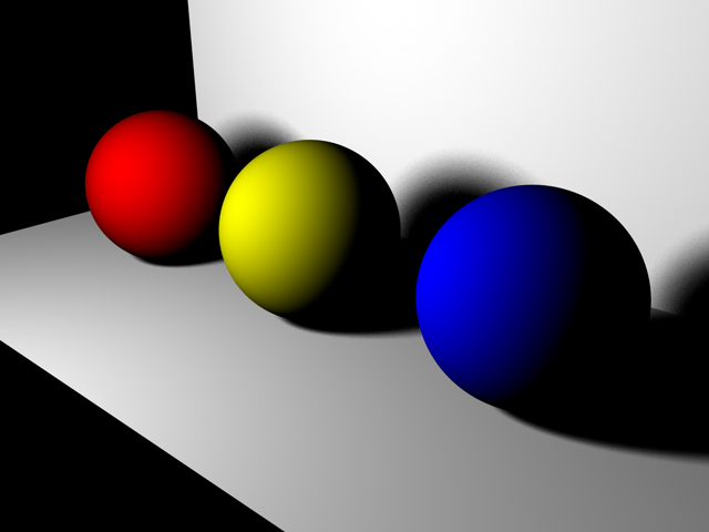 Renderbild ohne Radiosity Erstellt von: --Geierunited 23:02, 7. Jan 2005 (CET)